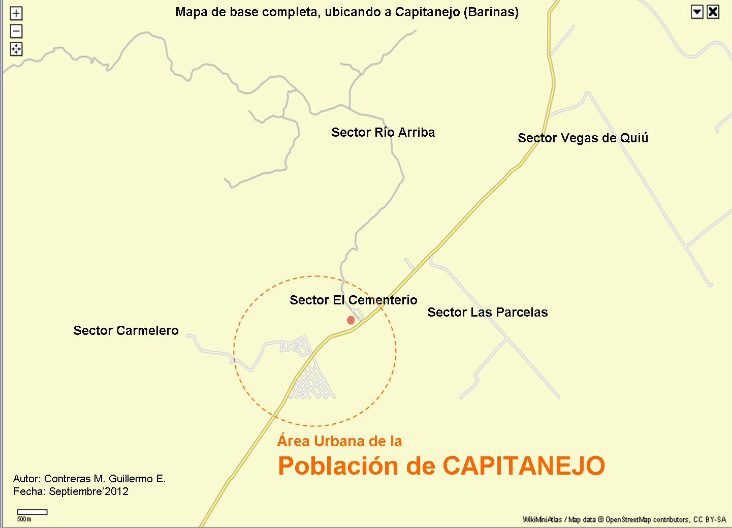 Ubicación Geográfica de Capitanejo (Barinas). En su alrededor se encuentran algunas comunidades rurales y suburbanas